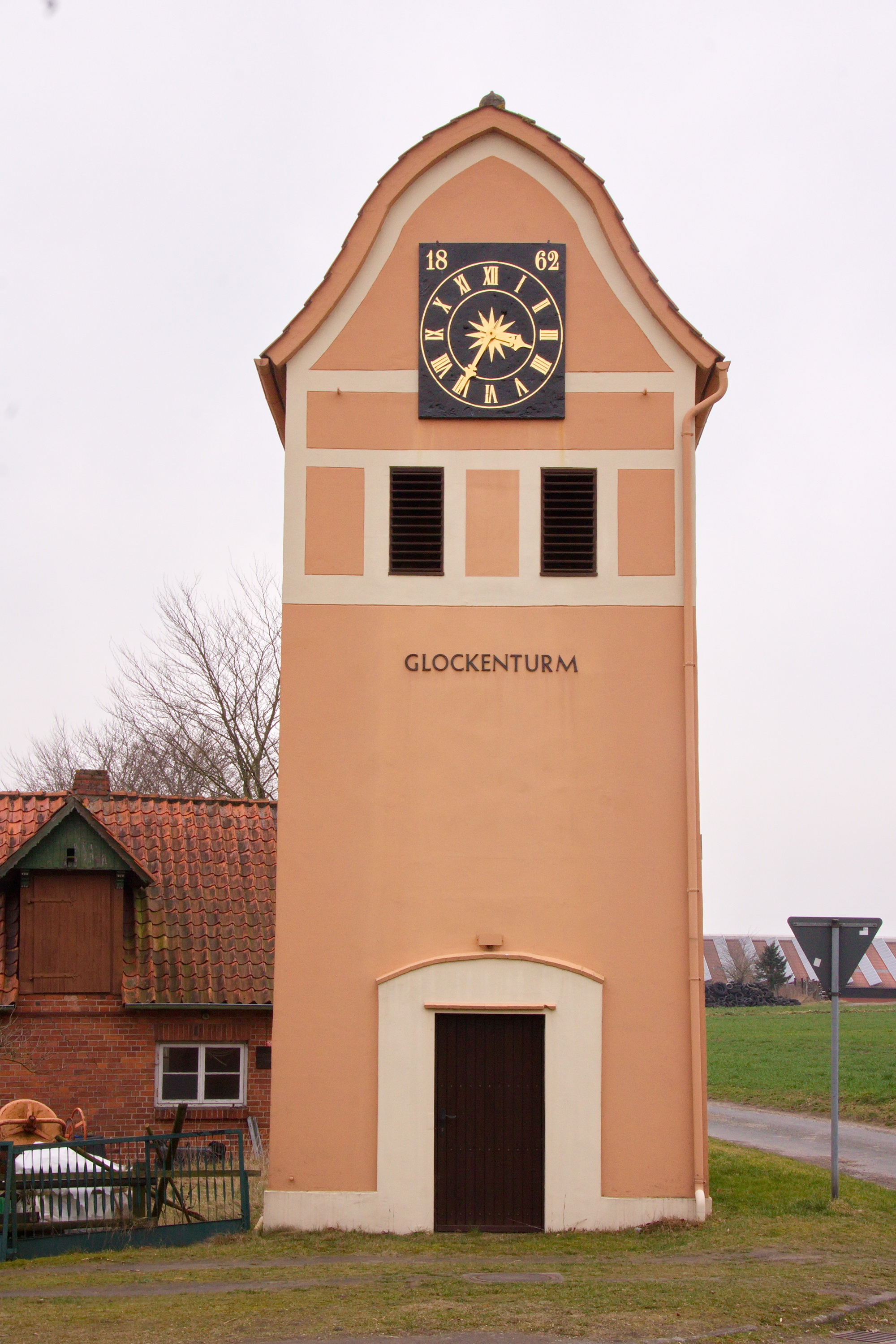 Glockenturm in Neddenaverbergen (Kirchlinteln), Niedersachsen, Deutschland